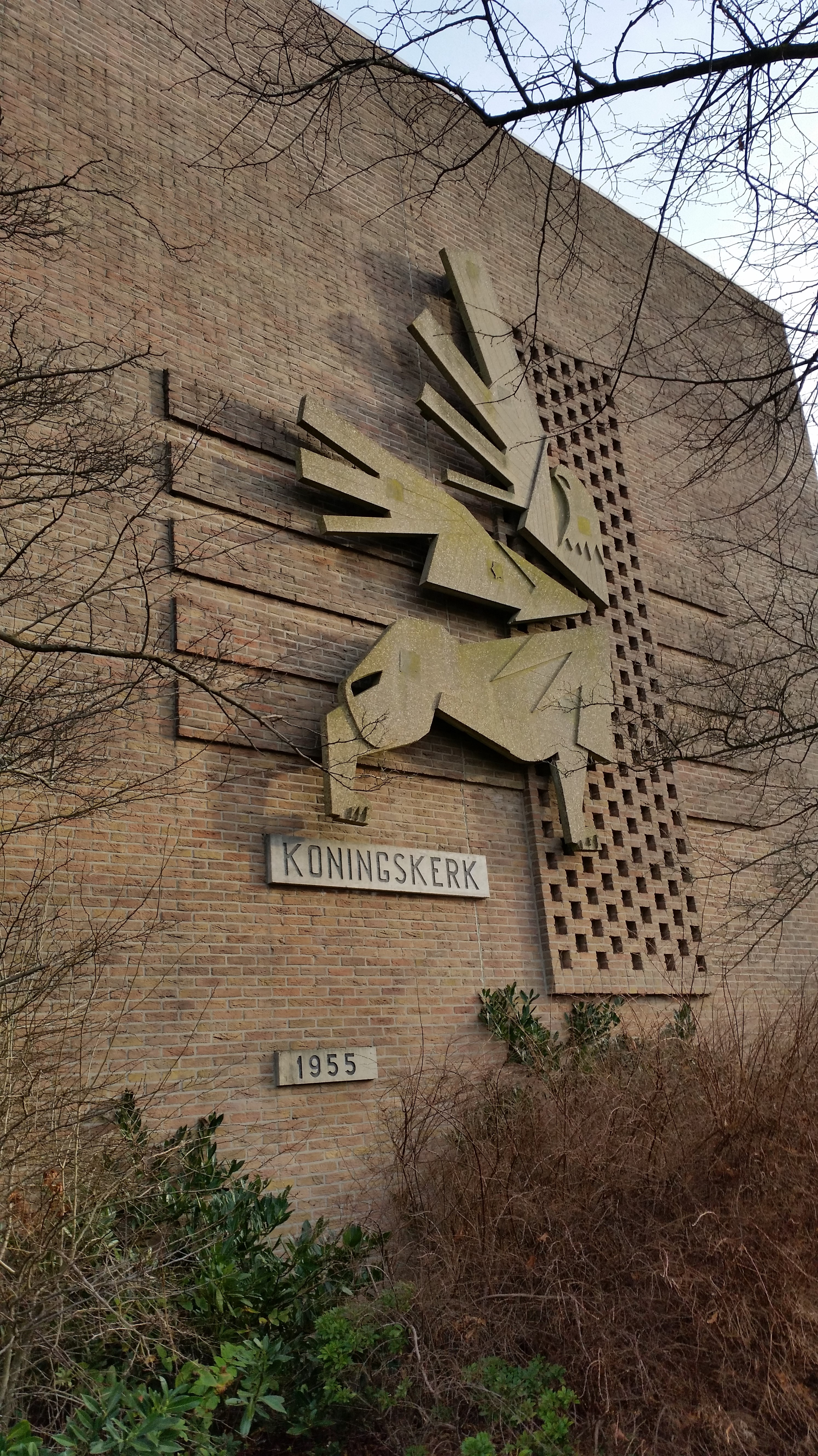 Impressie van de Koningskerk, Watergraafsmeer, Amsterdam-Oost; januari 2020